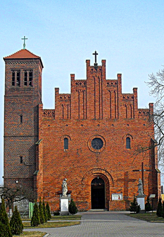 Kościół parafialny św. Jana Chrzciciela Prochowice, ul. Legnicka, Prochowice